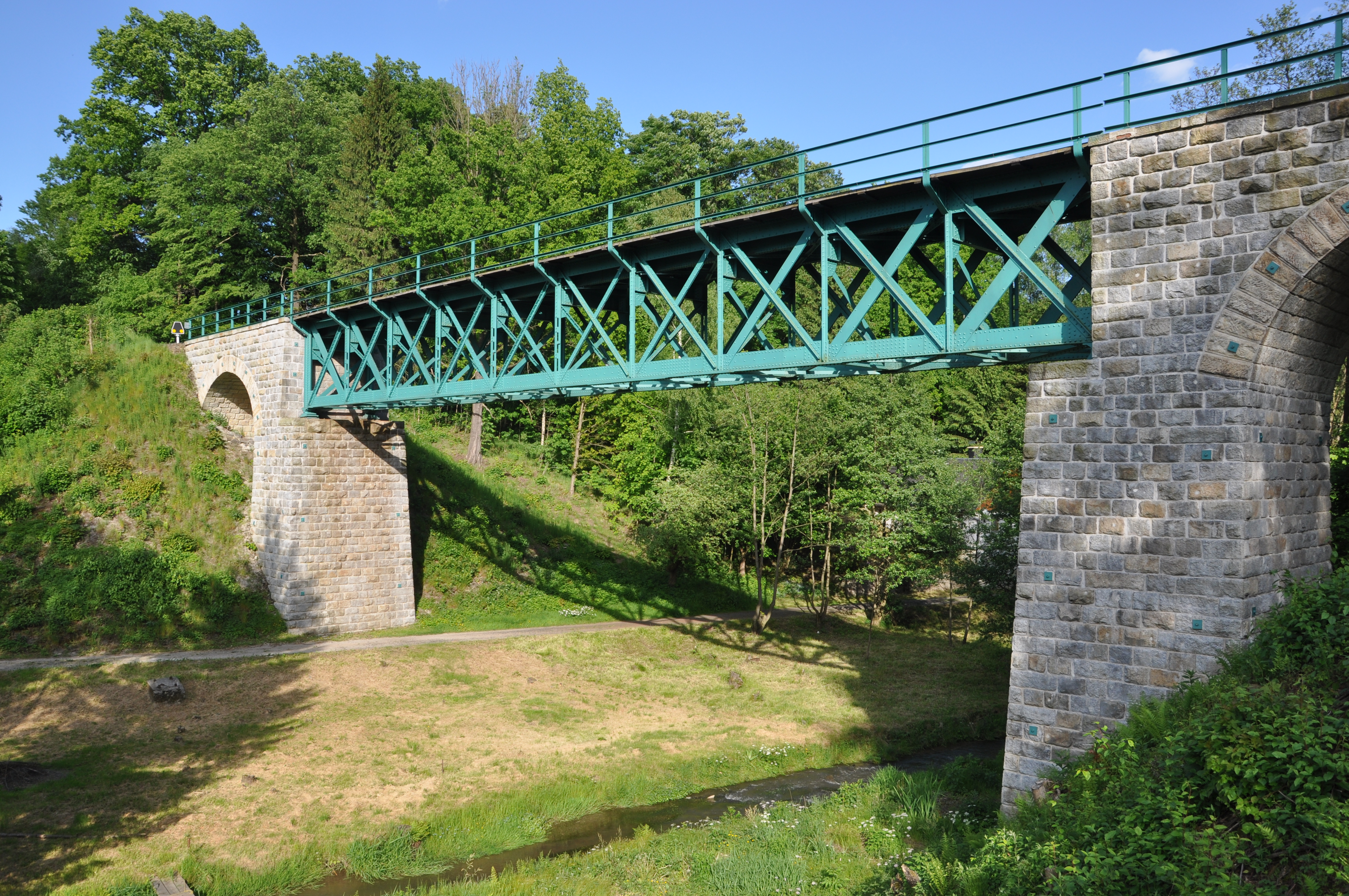 Brücke über den Luční potok bei Dolní Poustevna der Bahnstrecke Rumburk–Sebnitz